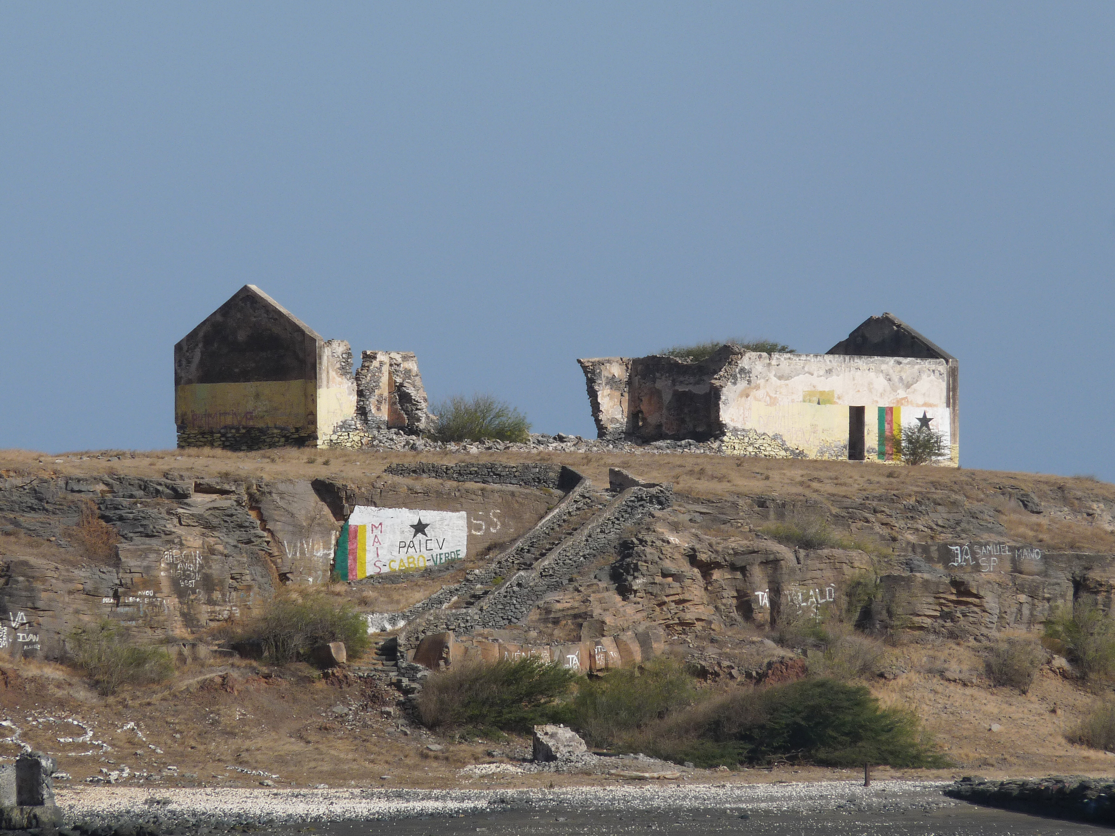 Praia (Cap-Vert) : îlot de Santa Maria